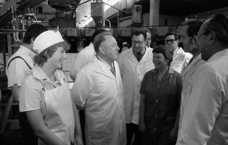 Erich Mielke in seinem Wahlkreis 36 ADN-ZB/Lehmann 28.5.81 Bez. Halle: In seinem Wahlkreis 36 führte der Spitzenkandidat der Volkskammer Erich Mielke (2.v.l.), Mitglied des Politbüros des ZK der SED und Minister für Staatssicherheit, einen Gedankenaustausch mit Genossenschaftsbauern der ZGE Milchproduktion Nessa, Kreis Höhenmölsen. Hier im Gespräch mit Mitgliedern der Jugendschicht Melkkarusell. Abgebildete Personen: Mielke, Erich: Minister für Staatssicherheit, Armeegeneral, Politbüro des Zentralkomitees (ZK) der SED, DDR (GND 118977490) Hans-Joachim Böhme: 1. Sekretär der SED-Bezirksleitung Halle, Mitglied des ZK der SED (rechts neben Mielke mit Brille)